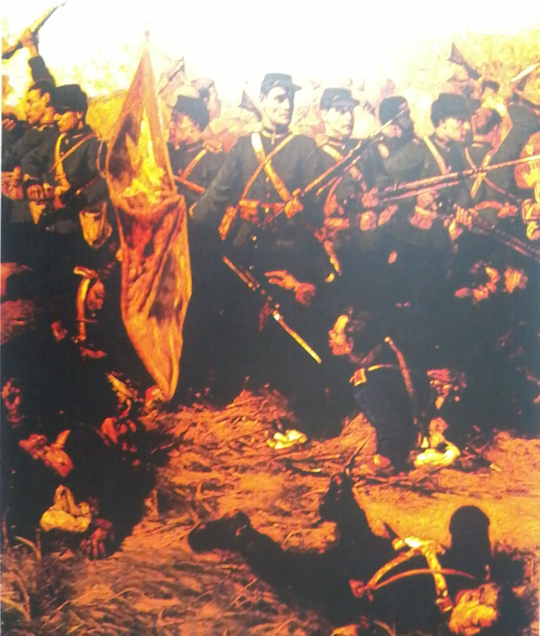 Ilustración que describe el momento en que el Guardia Civil Mariano Santos Mateo del Batallón Guardias de Arequipa de la III División del Ejército Peruano del Sur se apodera de la coronela del Regimiento 2º de Línea de la infantería del ejército de Chile durante la Batalla de Tarapacá ocurrida el 27 de noviembre de 1879.